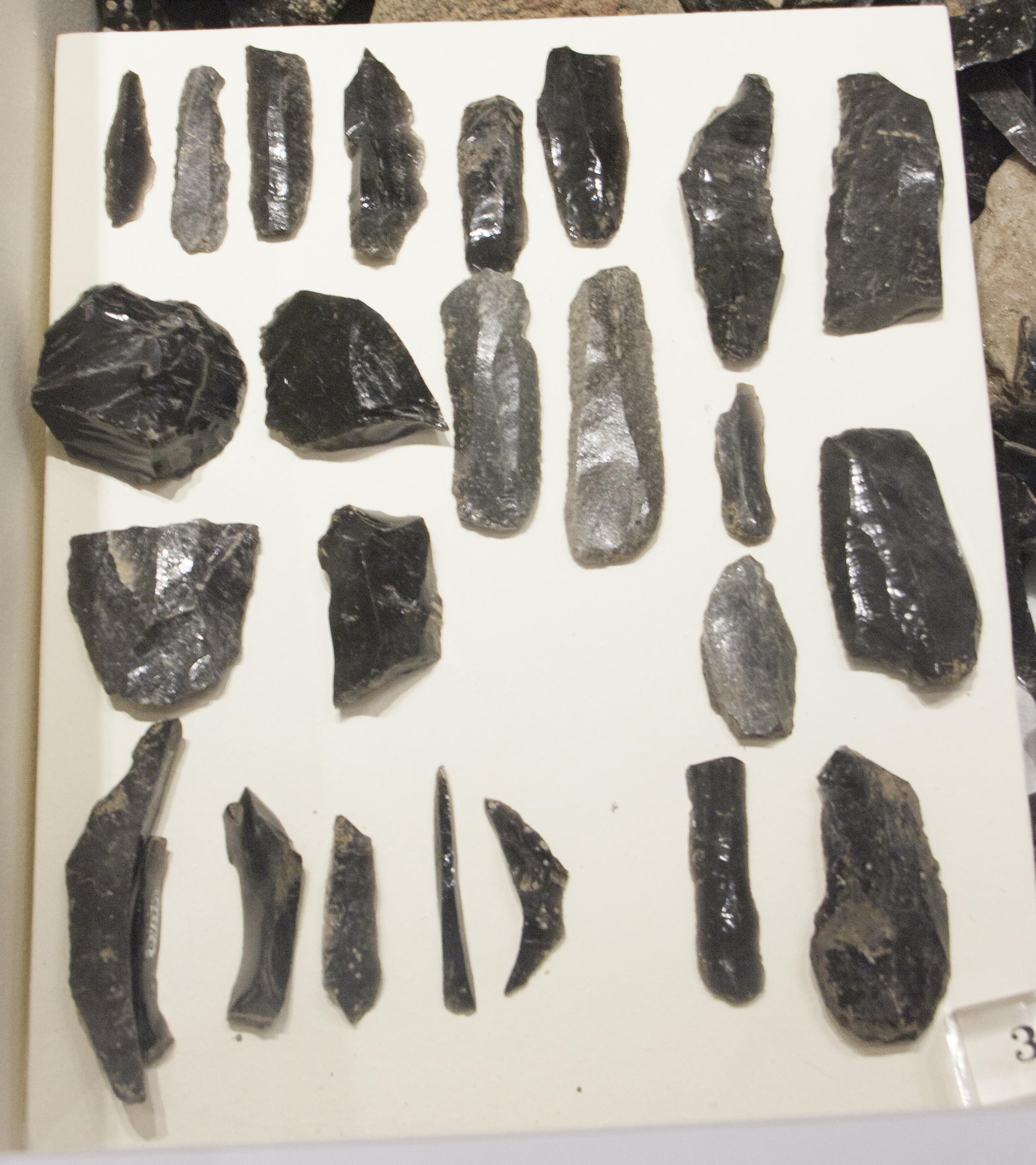 Cultura di Stentinello 5500-5000 a.C. Salina, Rinicedda